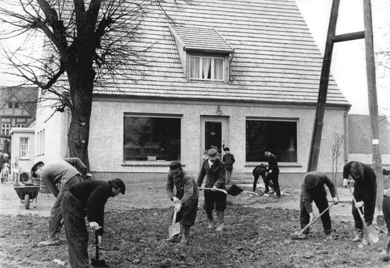 Watzkendorf, Einwohner bei Bauarbeiten Zentralbild Weigelt 17.3.61 Konsum Selbstbedienungsladen im Kreis Neustrelitz Tüchtig mitgeholfen haben die Einwohner von Watzkendorf, Kreis Neustrelitz beim Bau ihres Konsum-Selbstbedienungsladens und ihrer Konsum-Gaststätte. Bisher leisteten die Einwohner 3.100 Stunden im Nationalen Aufbauwerk. Anfang März wurde der Neubau eingeweiht. UBz: Einwohner bei Planierungsarbeiten.